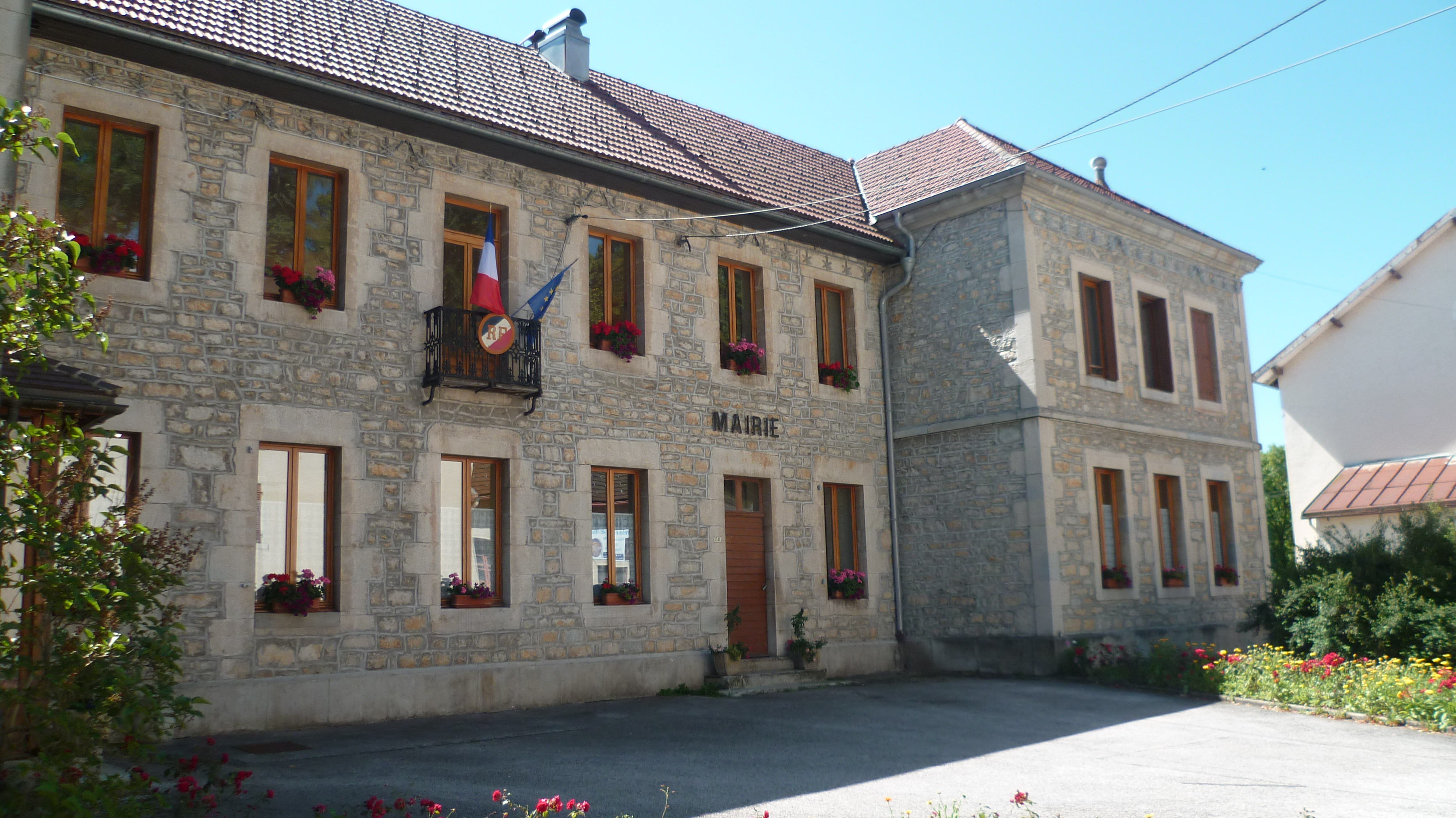 La mairie de Foncine-le-Haut, département du Jura, France